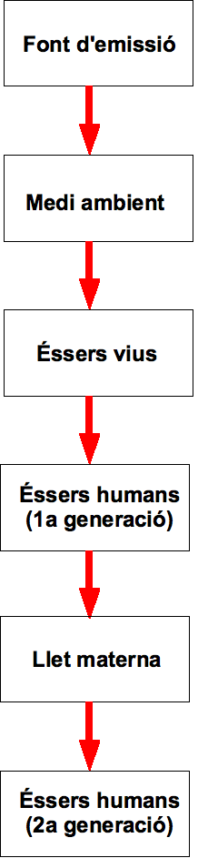 Cadena de bioacumulació de PCB